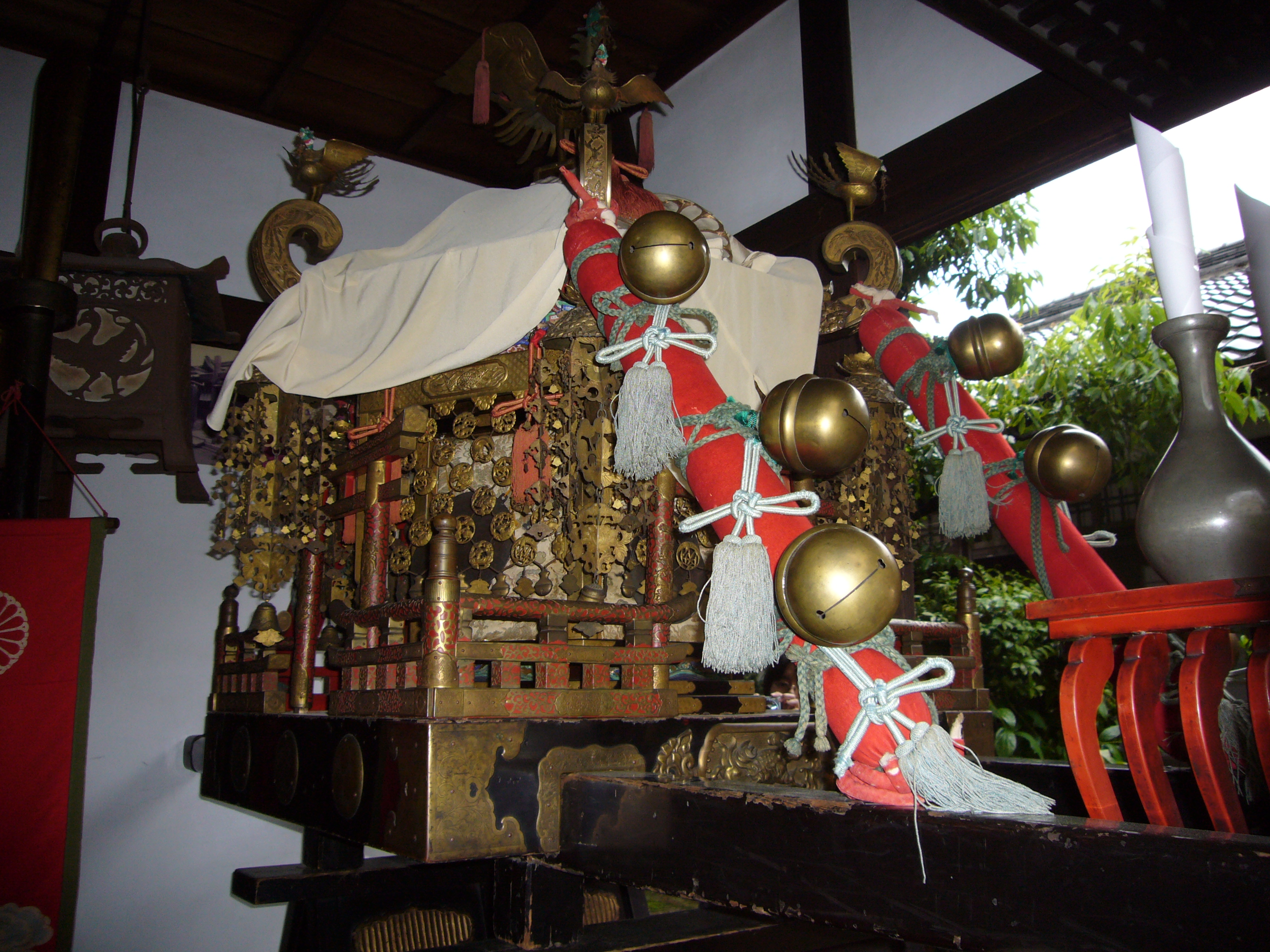 例祭の神輿（中御門天皇より拝領）